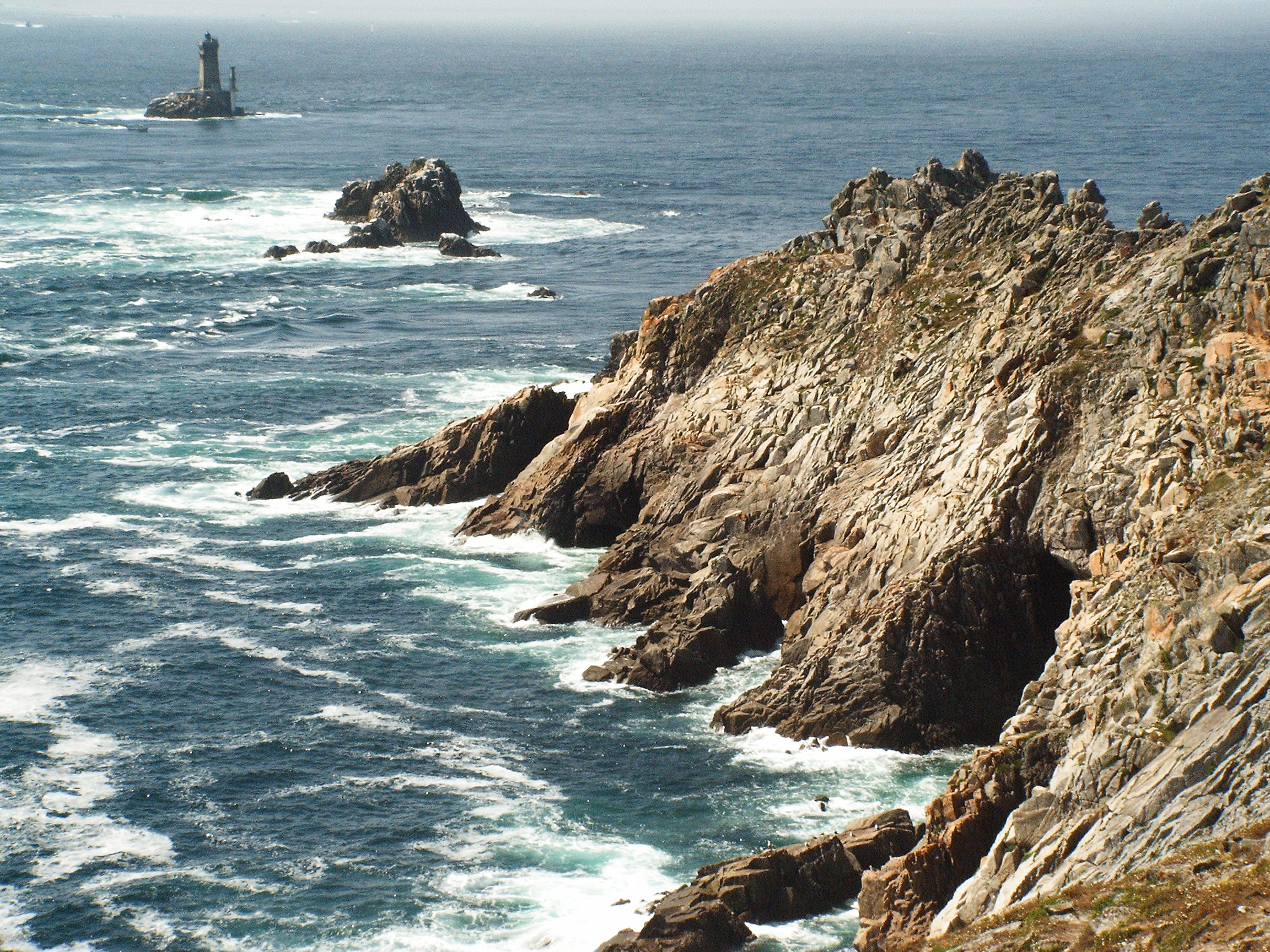 Felsformationen am Pointe du Raz in der Bretagne